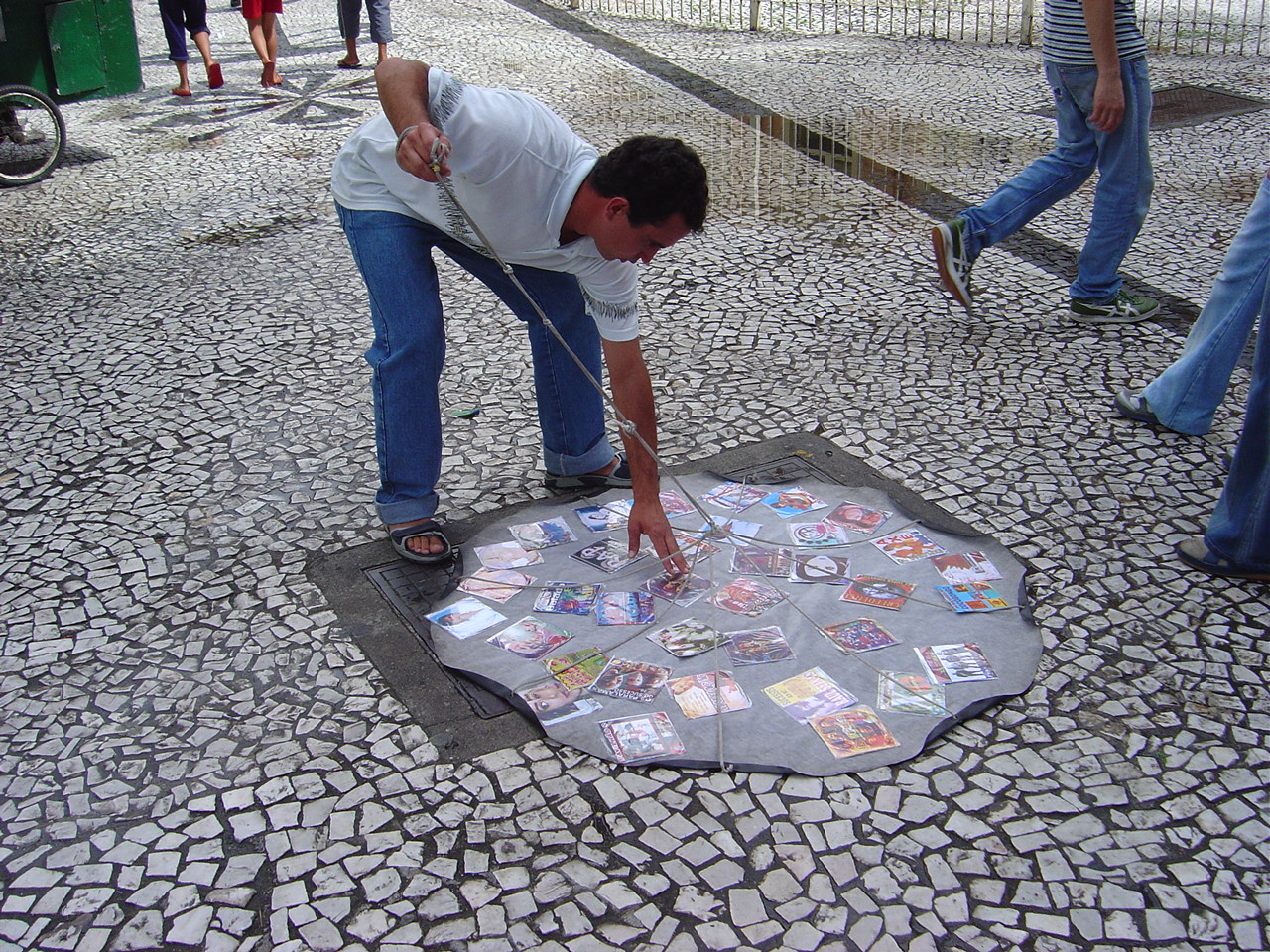 Exemplo de Gambiarra. Fonte: Rodrigo Boufleur, Curitiba, 2004 An exemple of "gambiarra" (improvised solution). Foto: Rodrigo Boufleur, Curitiba, Brazil, 2004